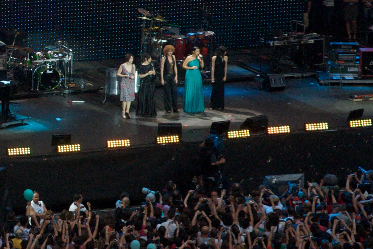 Fiorella Mannoia, Laura Pausini, Carmen Consoli, Elisa Toffoli, Giorgia Todrani, Amiche per l'Abruzzo, Stadio Giuseppe Meazza di San Siro a Milano, 21-06-2009